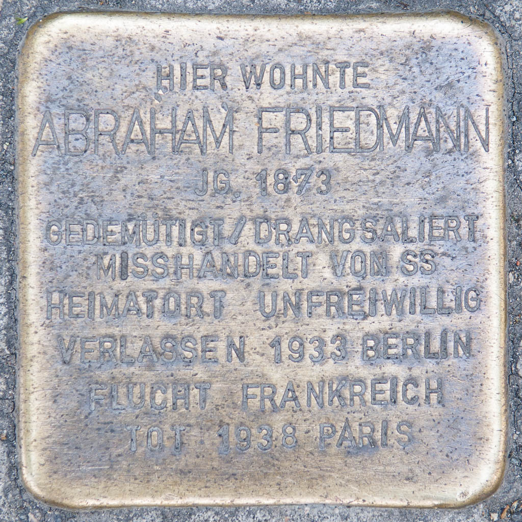 Stolperstein in Coburg Abraham Friedmann